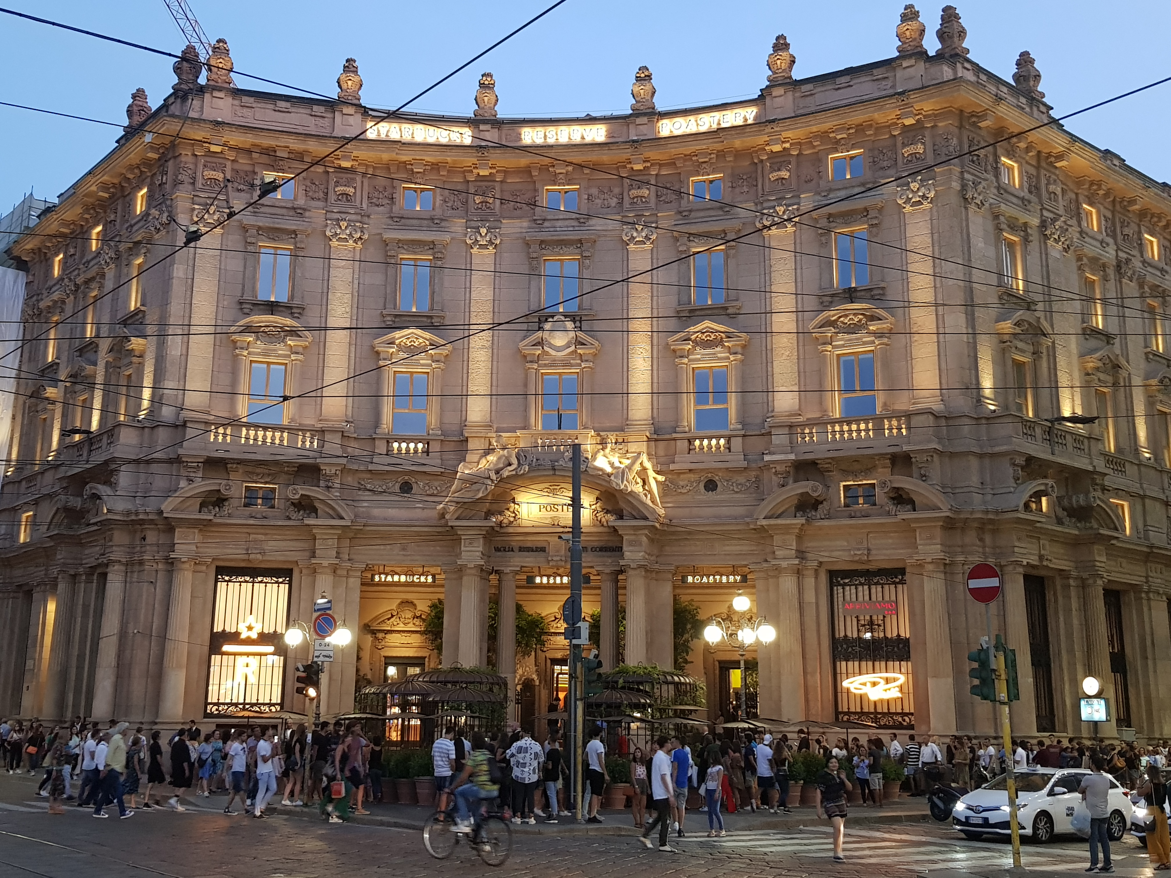 Palazzo Broggi - ora sede di Starbuck's Reserve Roastery This is a photo of a monument which is part of cultural heritage of Italy.